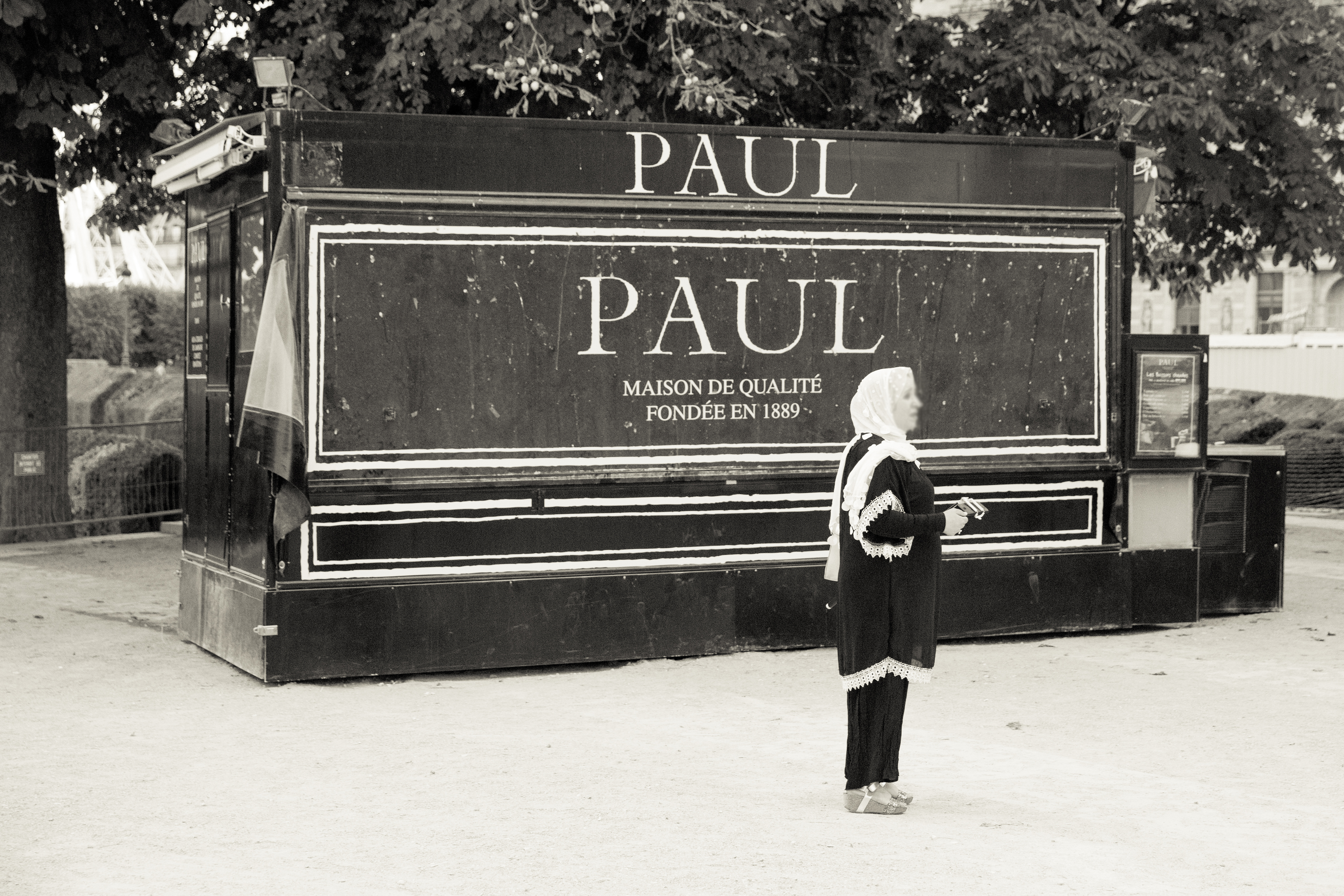 Paul restaurant, Louvre, Paris.